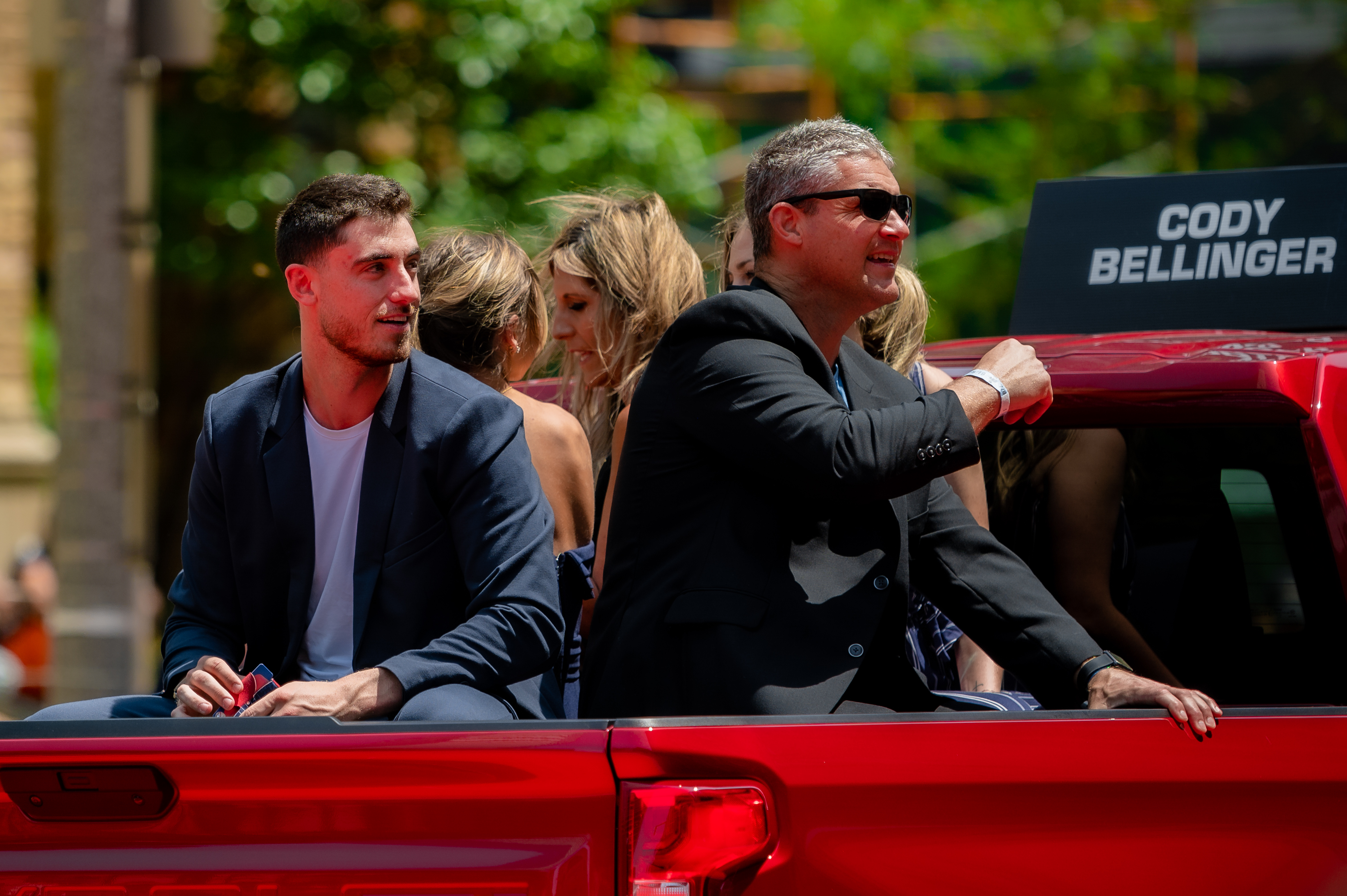 MLB All-Star Red Carpet Parade